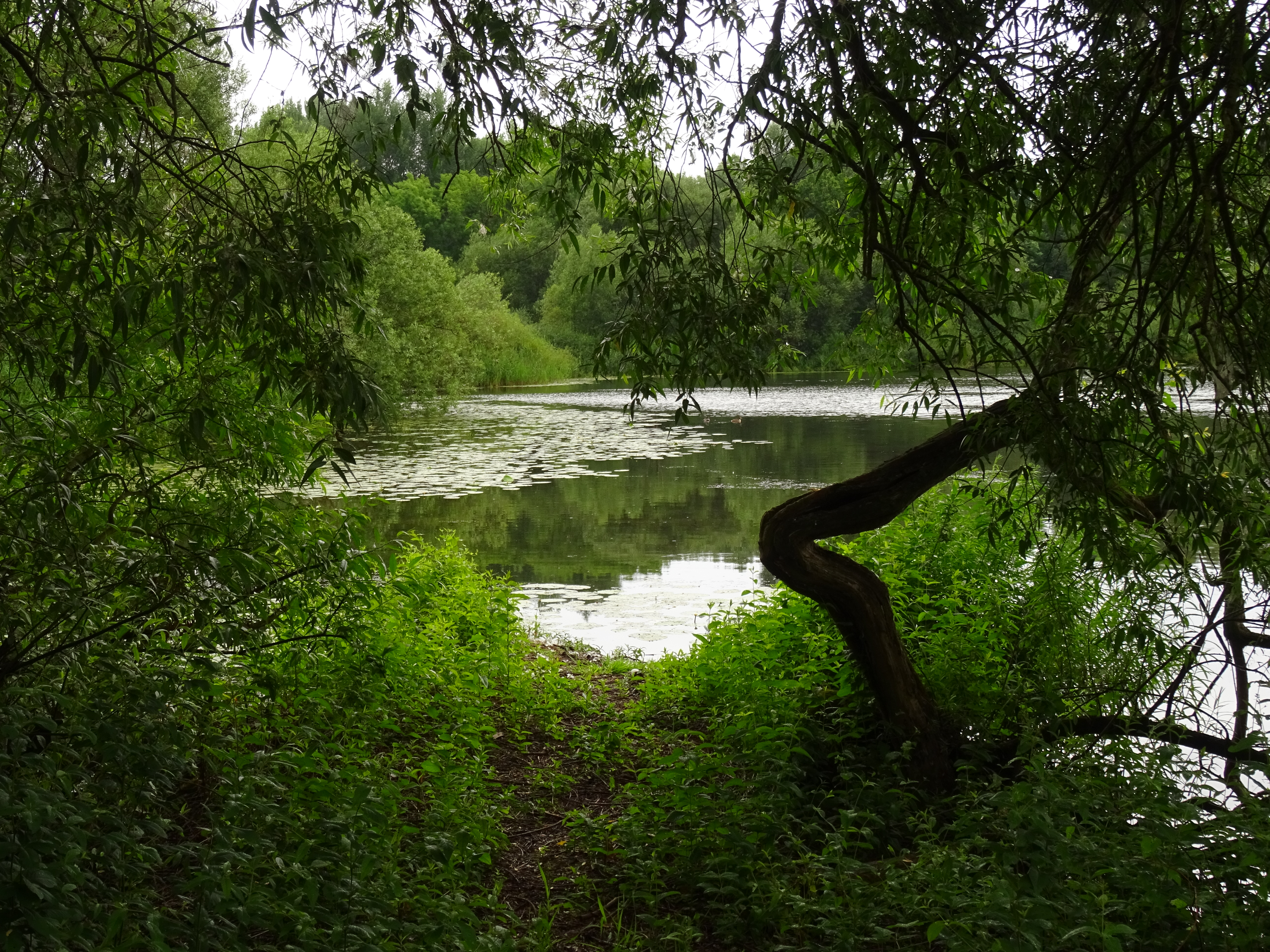 NSG Alte Leine zwischen Wilkenburg, Alt-Laatzen und Grasdorf